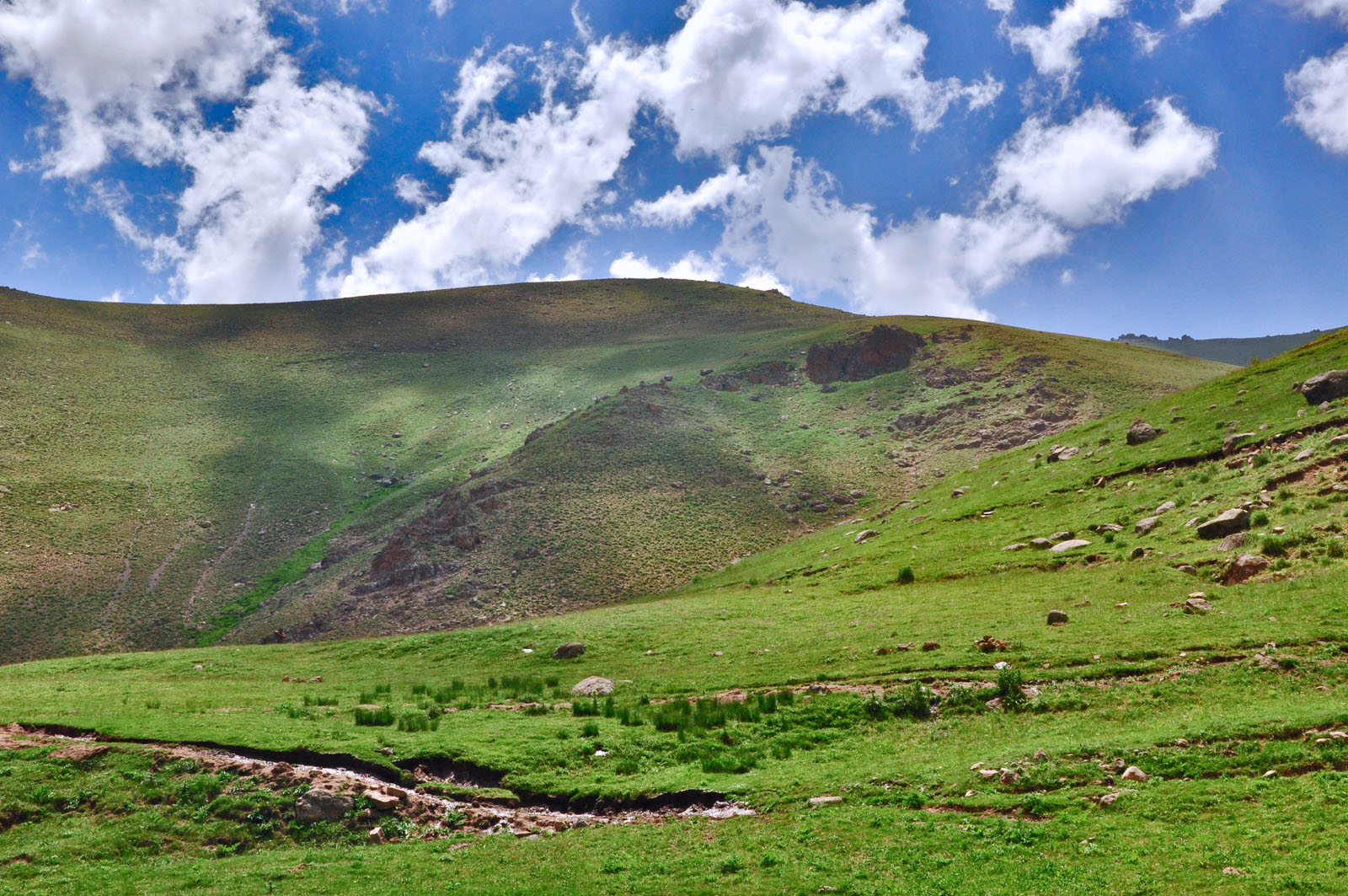 درمسير آبشار گورگورHills